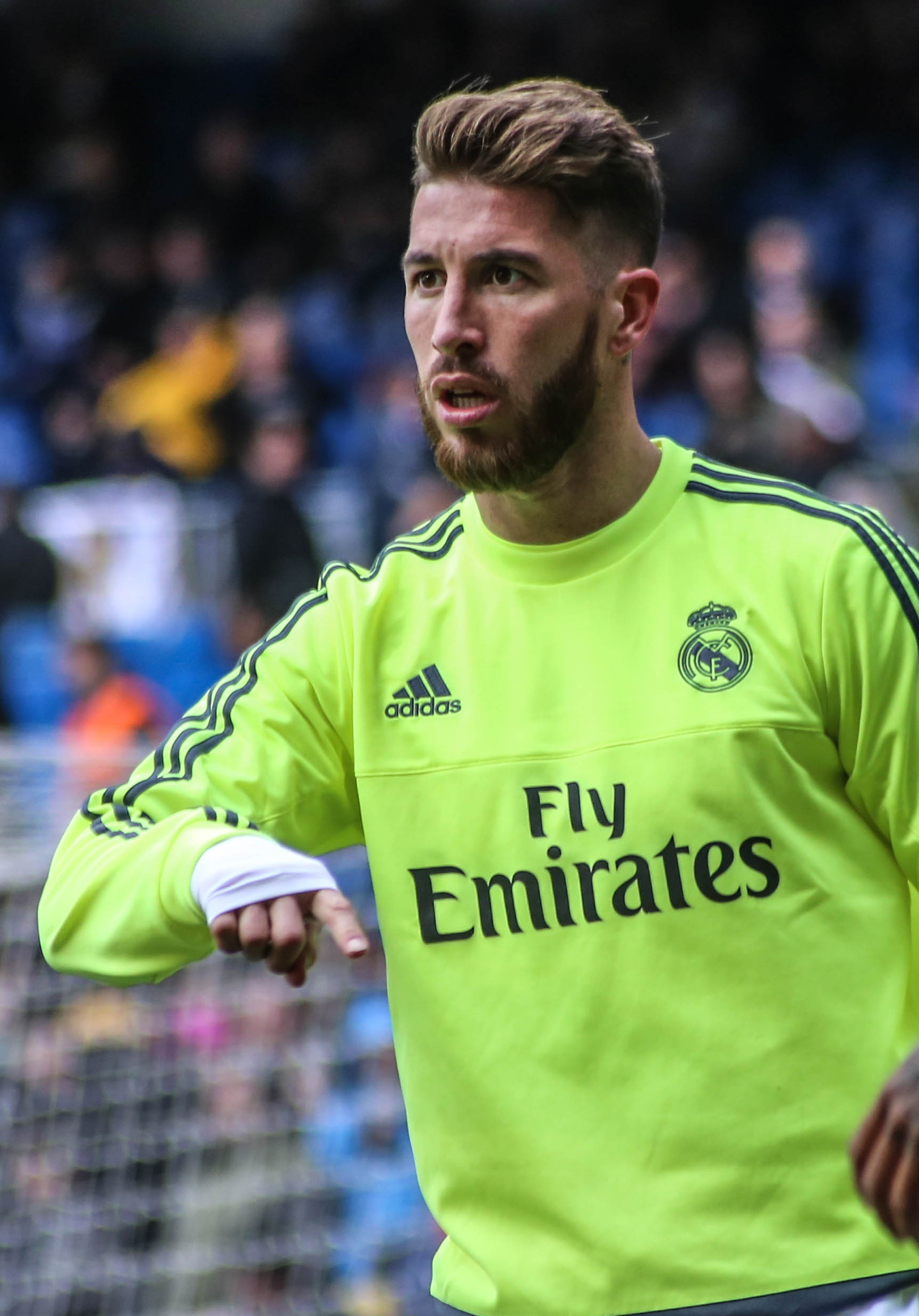 Sergio Ramos entrenando